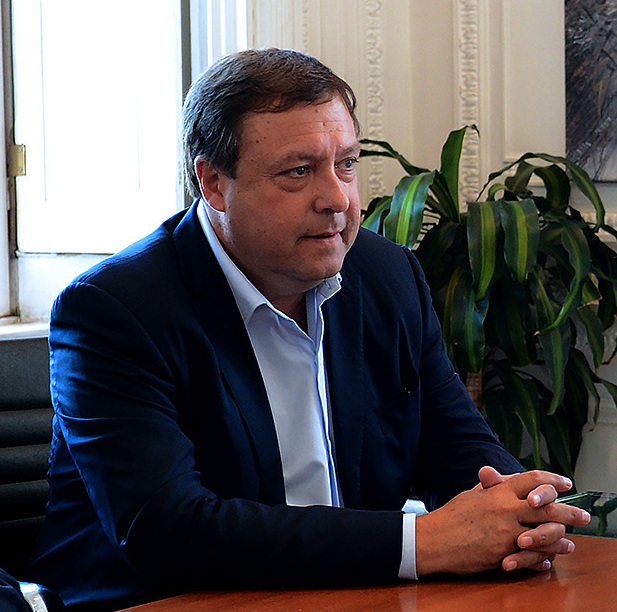 El jefe de Gabinete, Marcos Peña, analizó con el gobernador de Río Negro, Alberto Weretilneck, diversos temas vinculados con la situación de esa provincia durante una reunión que mantuvieron esta mañana en la Casa de Gobierno. El diálogo, que marcó el primer contacto institucional entre el nuevo Gobierno de la Nación y la administración rionegrina, incluyó políticas de viviendas, obras públicas y viales, la situación de las universidades y el estado de las economías regionales, entre otros asuntos. También participaron del encuentro el ministro de Interior, Obras Públicas y Vivienda, Rogelio Frigerio, y el senador nacional por Río Negro, Miguel Ángel Pichetto.